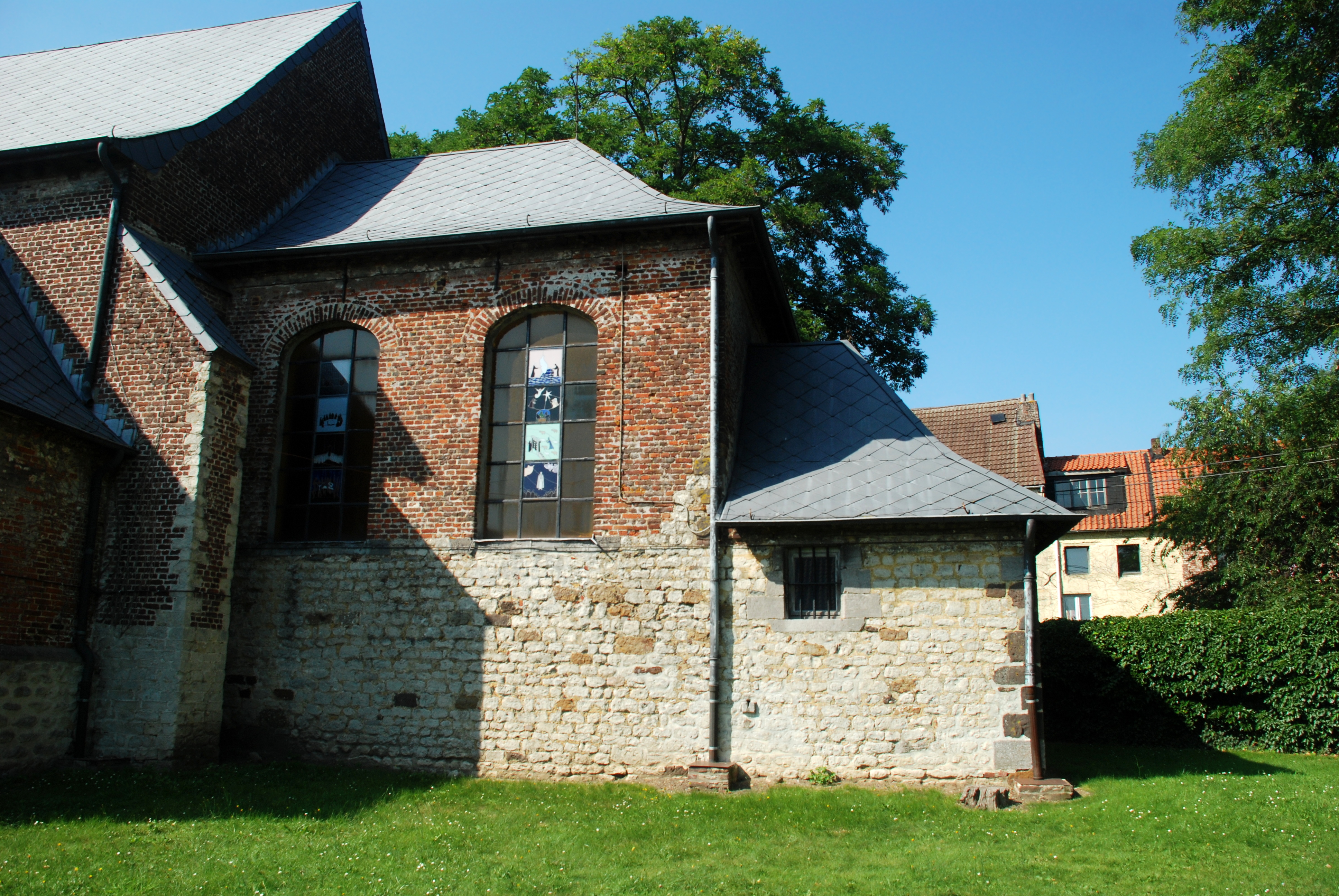 Belgique- Brabant wallon - Église Saint-Pierre de Glabais